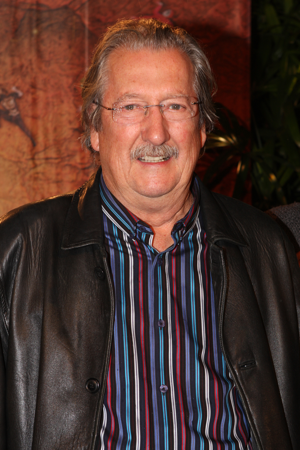 OVO OPENING NIGHT CELEBRITY ‘ORANGE’ CARPET ARRIVALS